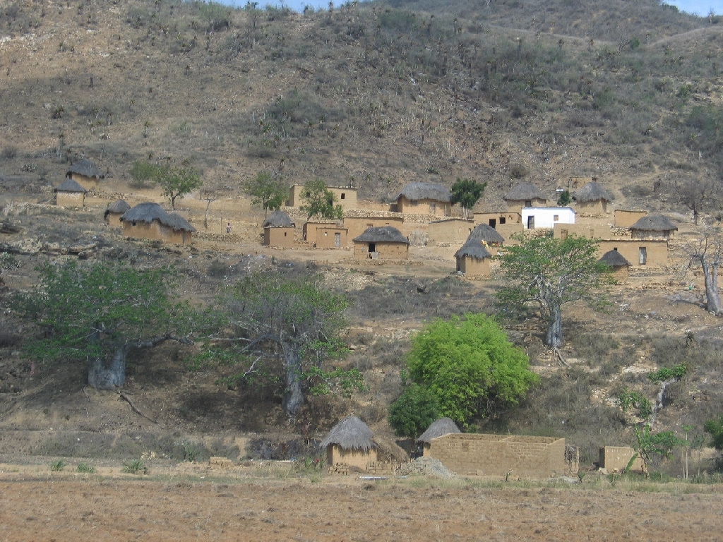 Ländliche Siedlung in der Nähe von Sumbe an der Strasse Luanda-Lobito in Angola